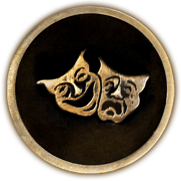 Symbol der Kategorie Fernsehen (television) der Sterne auf dem Hollywood Walk of Fame.